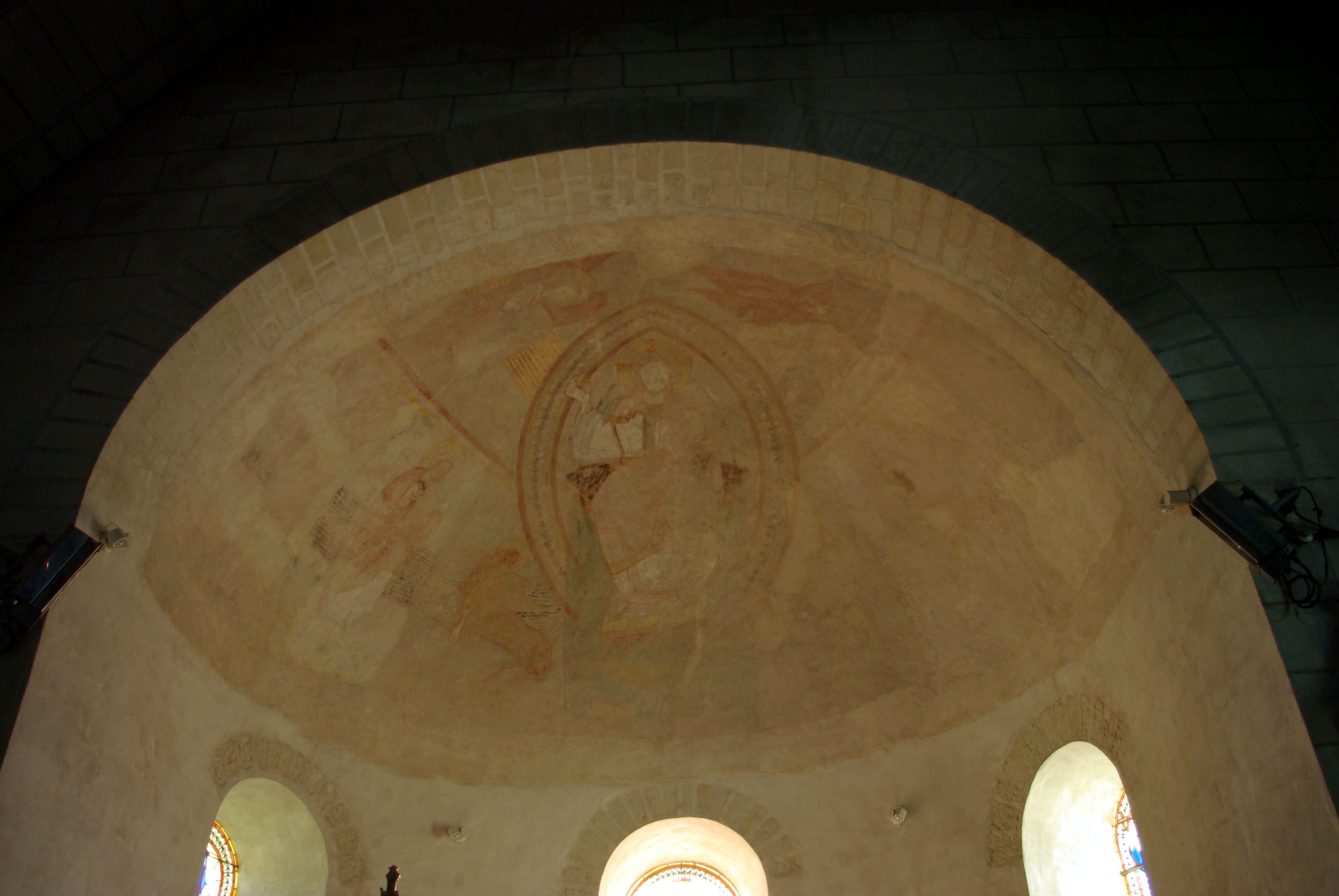 Voûte décorée du chœur de l'église Saint-Pierre de Parçay-Meslay. This building is en partie classé, en partie inscrit au titre des Monuments Historiques. .